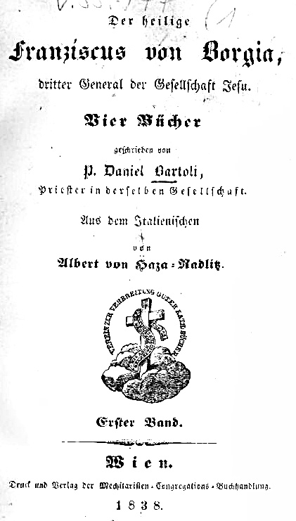 Albert von Haza-Radlitz (1798-1872) deutscher Reichstagsabgeordneter, Buchtitelblatt eines religiösen Werkes